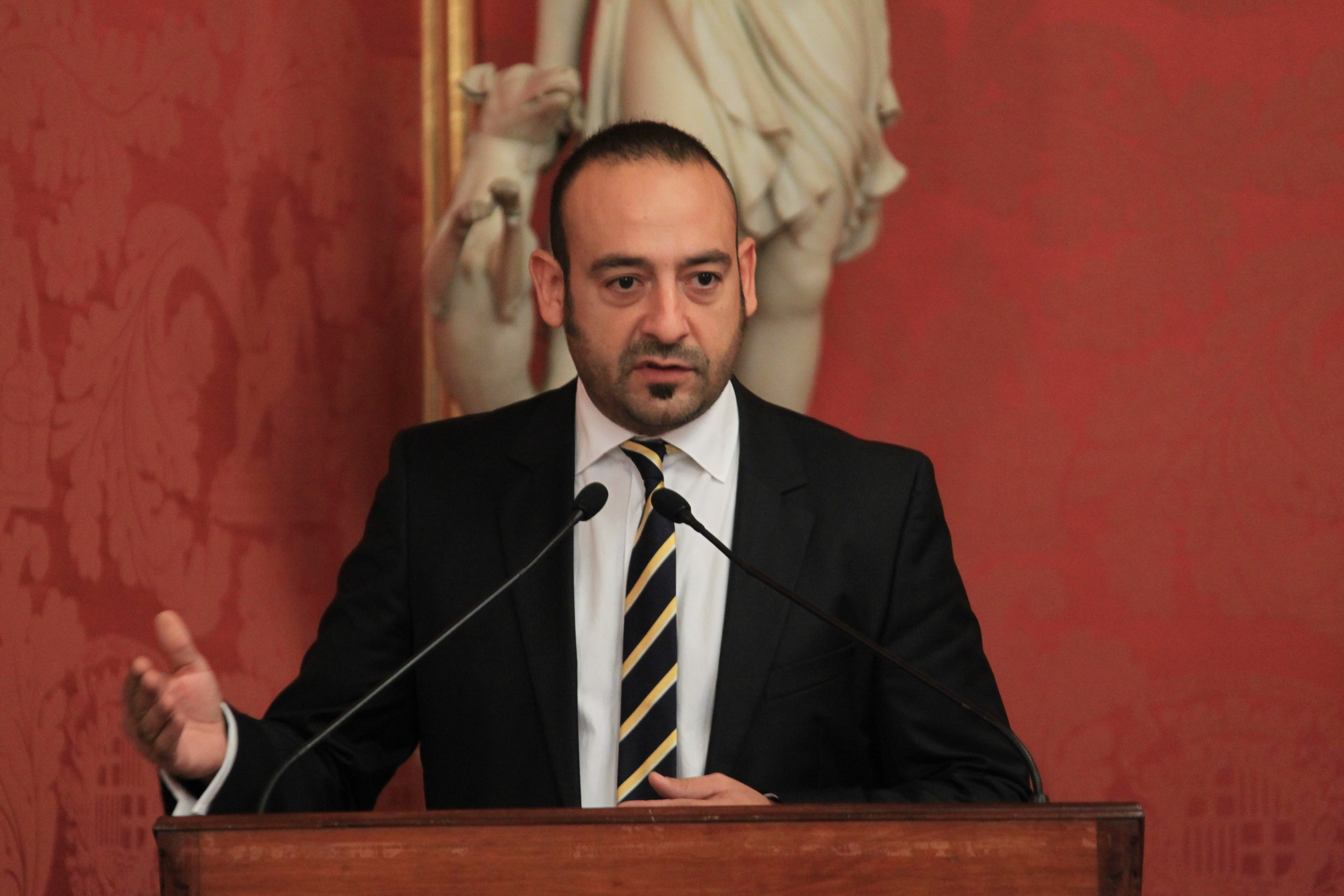 Jordi Cañas, portaveu de Ciutadans intervè en l'esmorzar electoral de la Cambra a Casa Llotja.